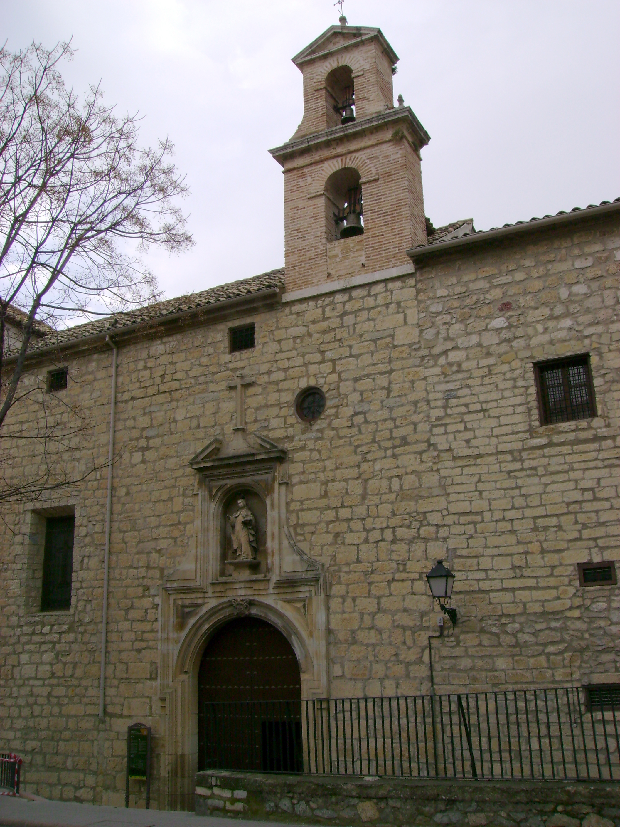 Convento de Santa Teresa de Jaén.